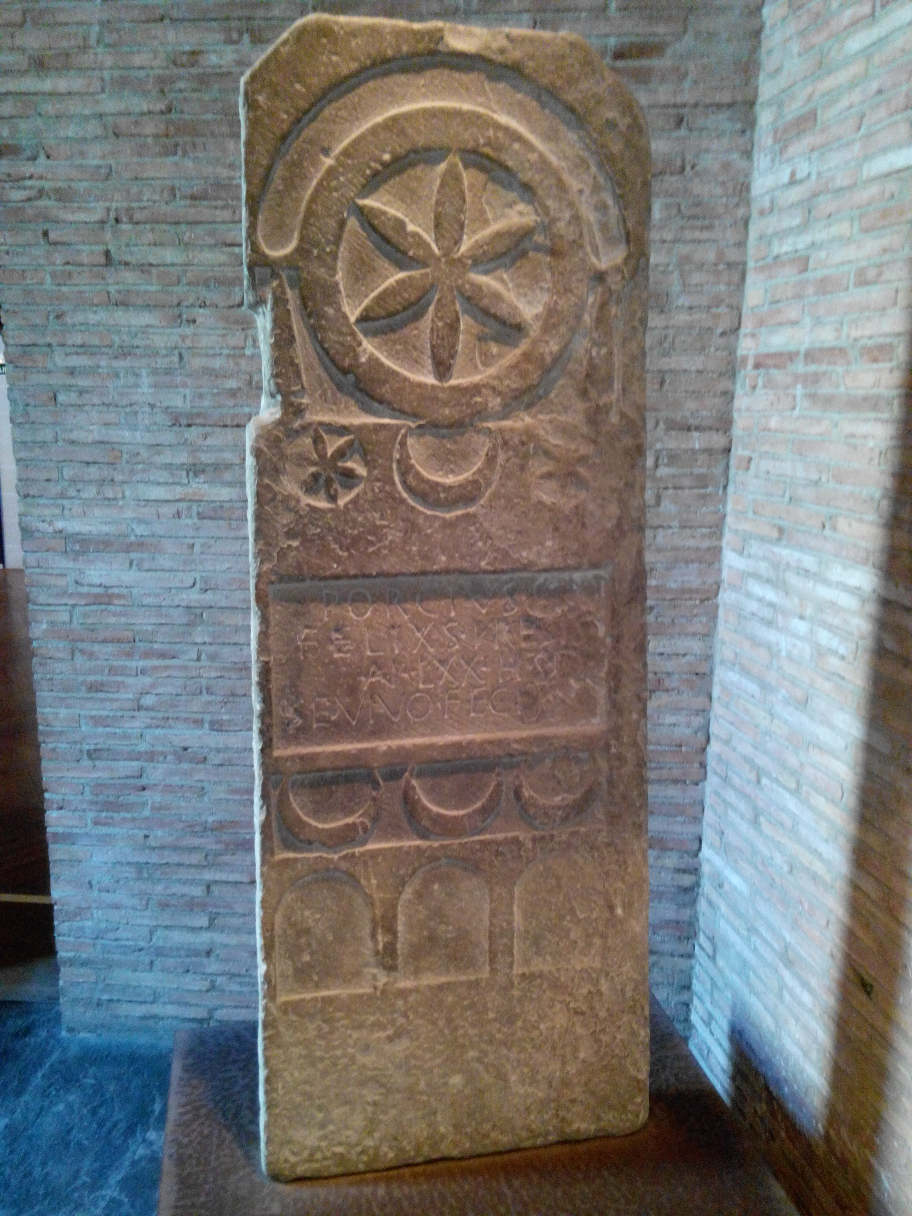 Inscripción funeraria en arenisca de grano fino y de forma prismática. Se lee: Porcius Felixs, k(a)re(n)sis, an(norum) LXX. H(ic) s(itus) e(st) (IRMN nº 39) Actualmente se conserva en el Museo de Navarra. Se localizó en el Monasterio de la Oliva aunque se supone era procedente de Carcastillo.